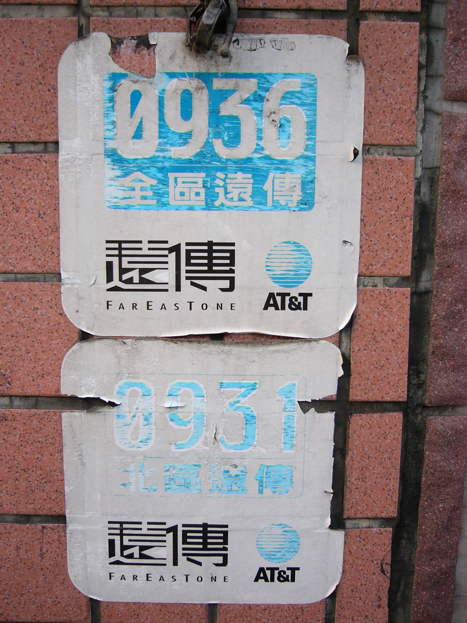 中文（台灣）: 遠傳電信「0936全區遠傳」與「0931北區遠傳」廣告貼紙，下半部印遠傳電信與AT&T商標。